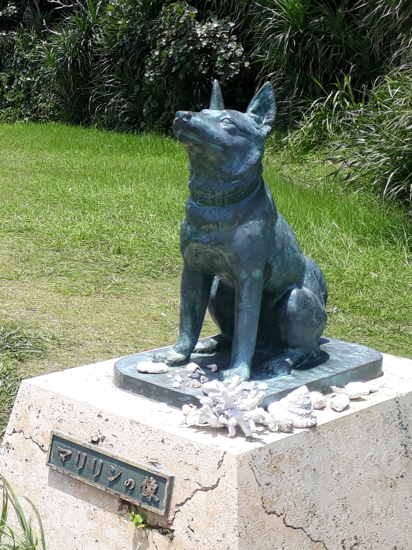 Statue de Marilyn, Zamami, Okinawa